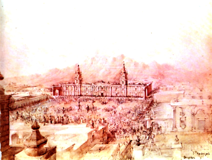 Plaza de Armas y catedral de Arequipa en un día festivo. Hacia 1855.